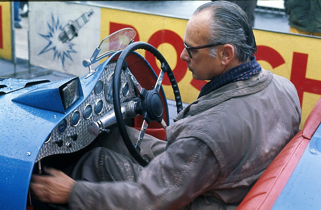 Dries van der Lof im Delahaye MS 135, Bj 1935